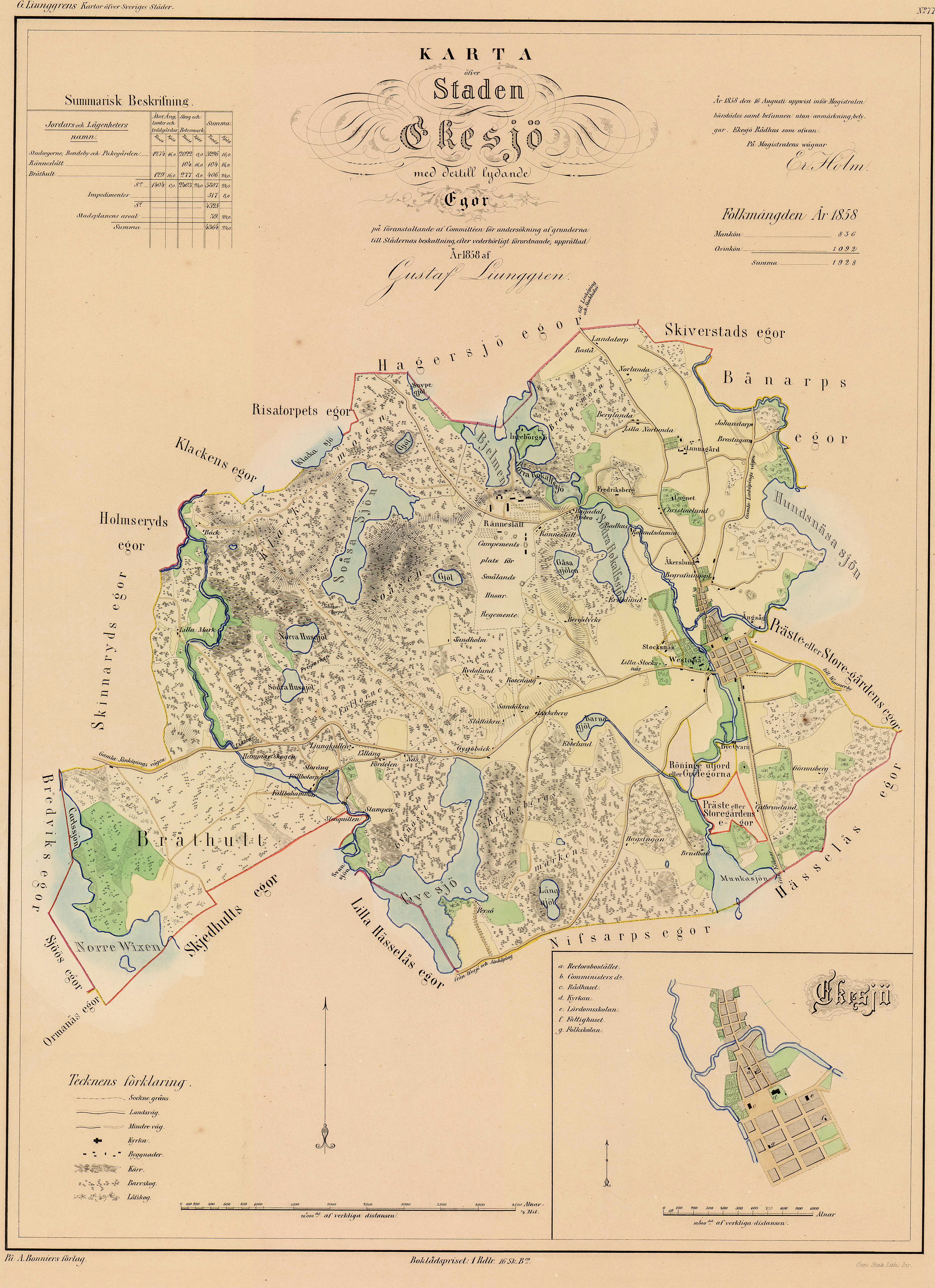 Karta över Eksjö från 1850-talet av Erik Gustaf Ljunggren ifrån samlingen Atlas öfver Sveriges städer med deras ägor.